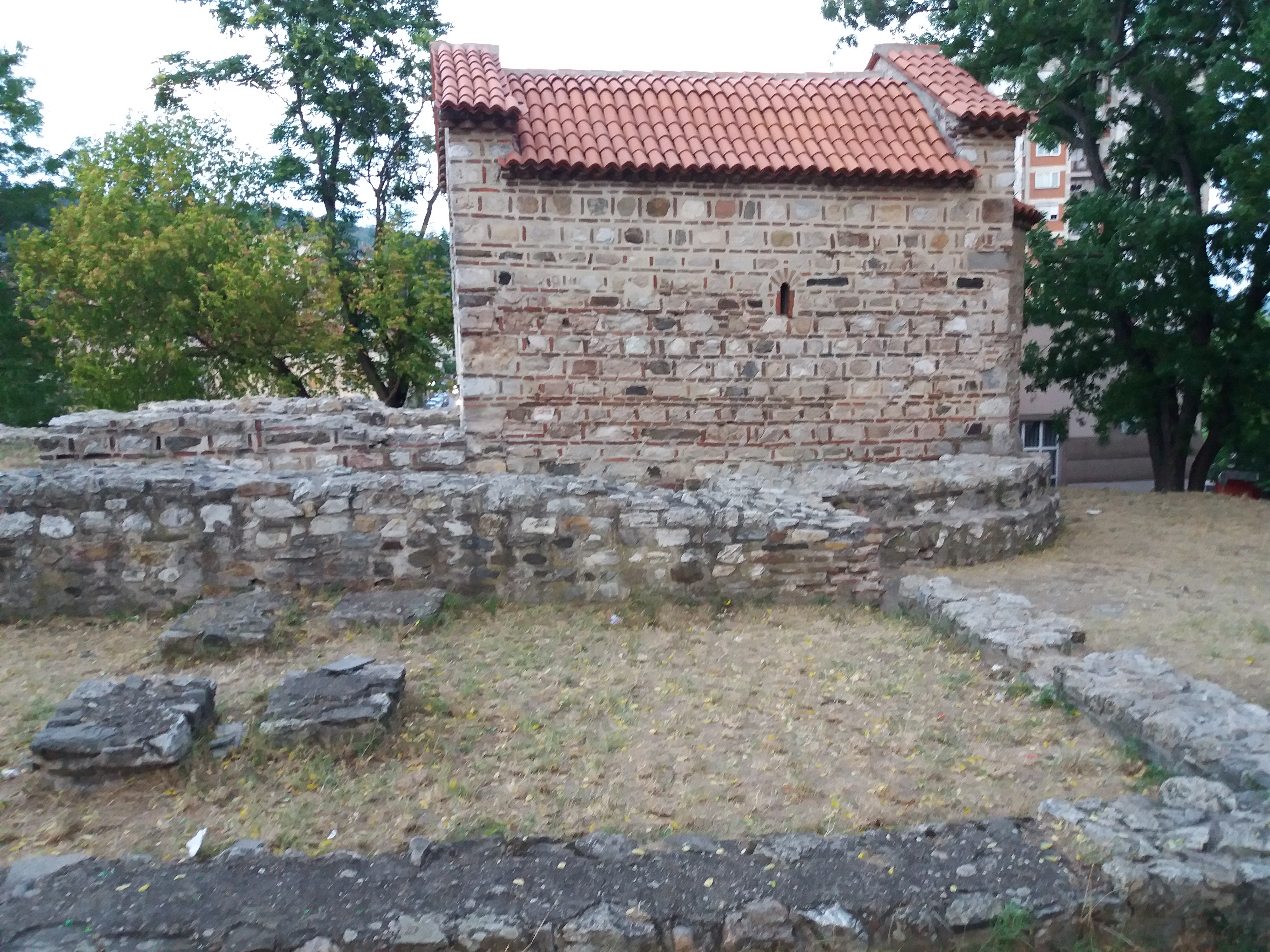 Srpski (latinica): Latinska crkva, Prokuplje